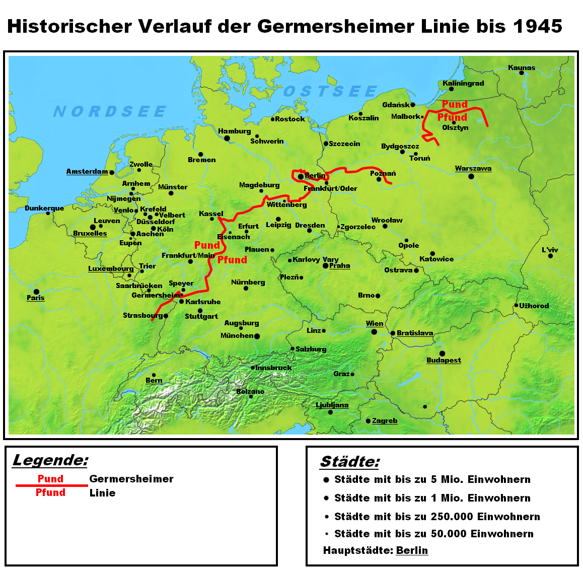 Darstellungskarte des historischen Verlaufes der Germersheimer Linie. Die hochdeutschen Sprachinseln westlich und nördlich davon werden nicht dargestellt, da es sich hierbei nicht um das Ergebnis einer Lautverschiebung, sondern um spätere Siedlungsbewegungen von Süden nach Norden handelt. Es wurde auch bewusst auf die Darstellung jeglicher Sprachgrenzen verzichtet.